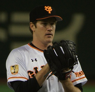 Giants micoras